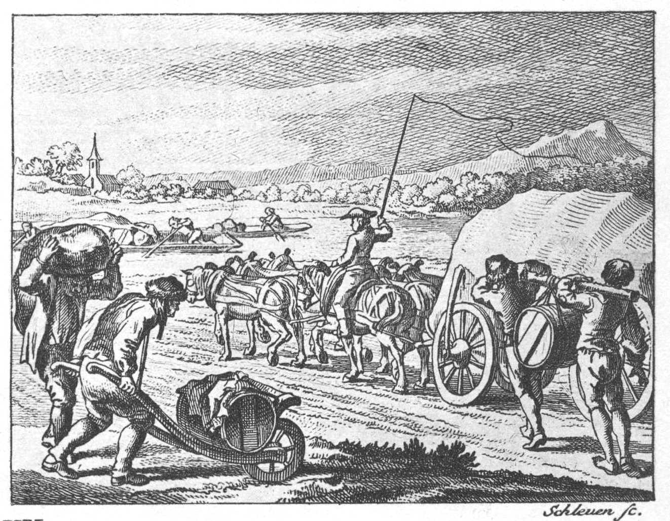 Tab. XX. Einige Arten nützlicher Beschäftigungen. d) Das Tragen, Schieben und das Fahren zu Wasser und zu Lande. (Beschreibung lt. Quelle)